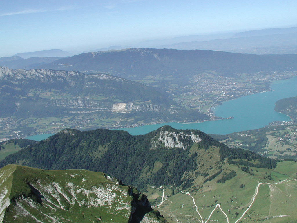 Le lac d'Annecy vu depuis le sommet de la Tournette. Sur la rive en contre-bas, de gauche à droite : le col de la Forclaz (masqué), le chalet de l'Aulp, au bord du lac le village de Talloires, célèbre pour héberger l'un des meilleurs restaurants de France, l'Auberge du père Bise, puis le roc de Chère, réserve naturelle. Le long de la rive opposée, les hameaux de Bout-du-Lac et de Bredanne (commune de Doussard). À l'endroit où le lac fait un coude, l'agglomération de Duingt ; sur la presqu'île se trouve le château de Ruphy (privé). Après Duingt, la rive s'élargit vers les hameaux de Filly et de Monnetier et l'on découvre toute la commune de Saint-Jorioz ; enfin, à l'extrême droite débute Sevrier. Enfin, on distingue facilement au-dessus de Doussard et de Duingt le Taillefer et, au second plan, le massif du Semnoz.